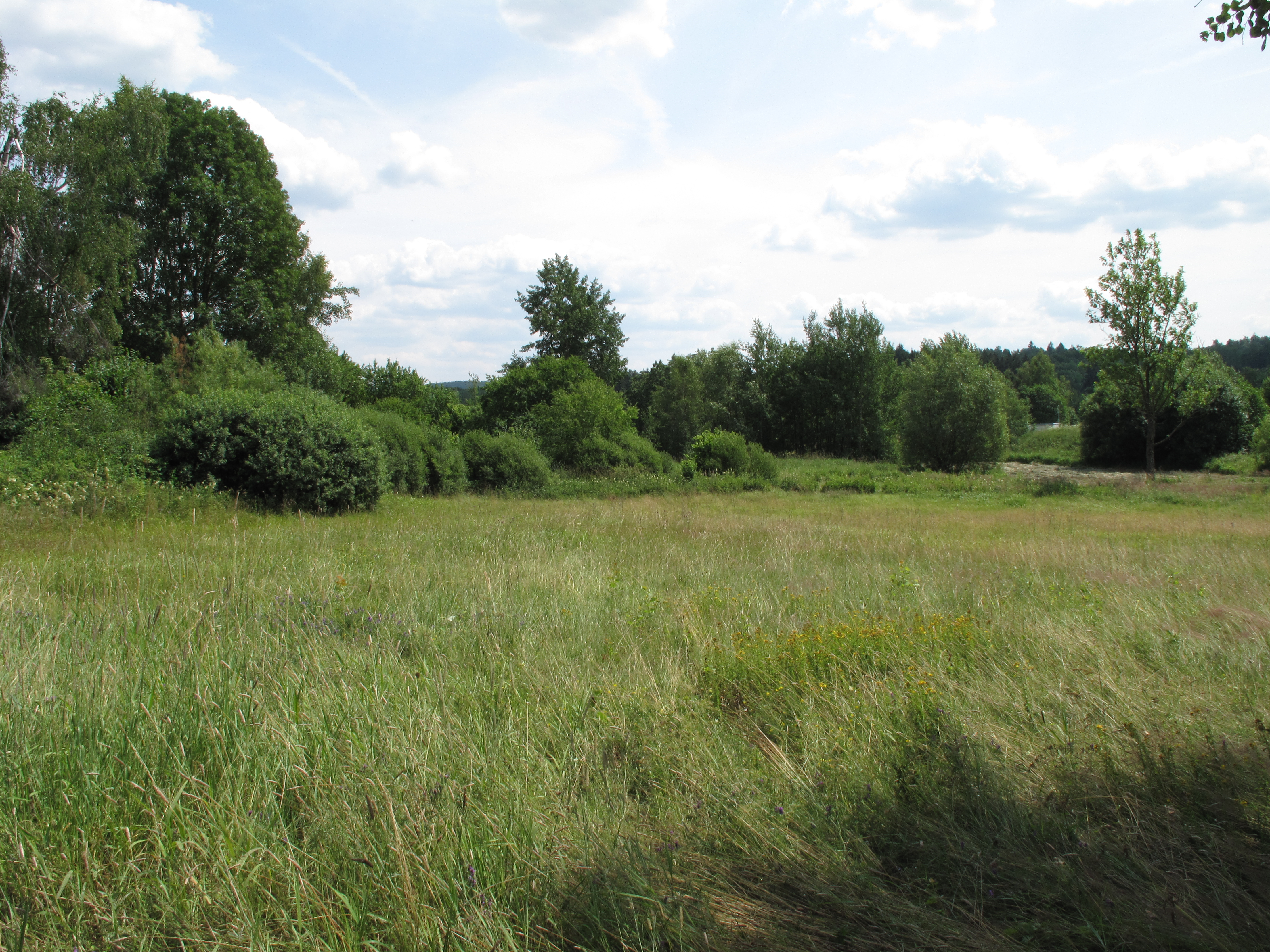 Přírodní rezervace Na Oklice. Okres Jihlava, Česká republika.